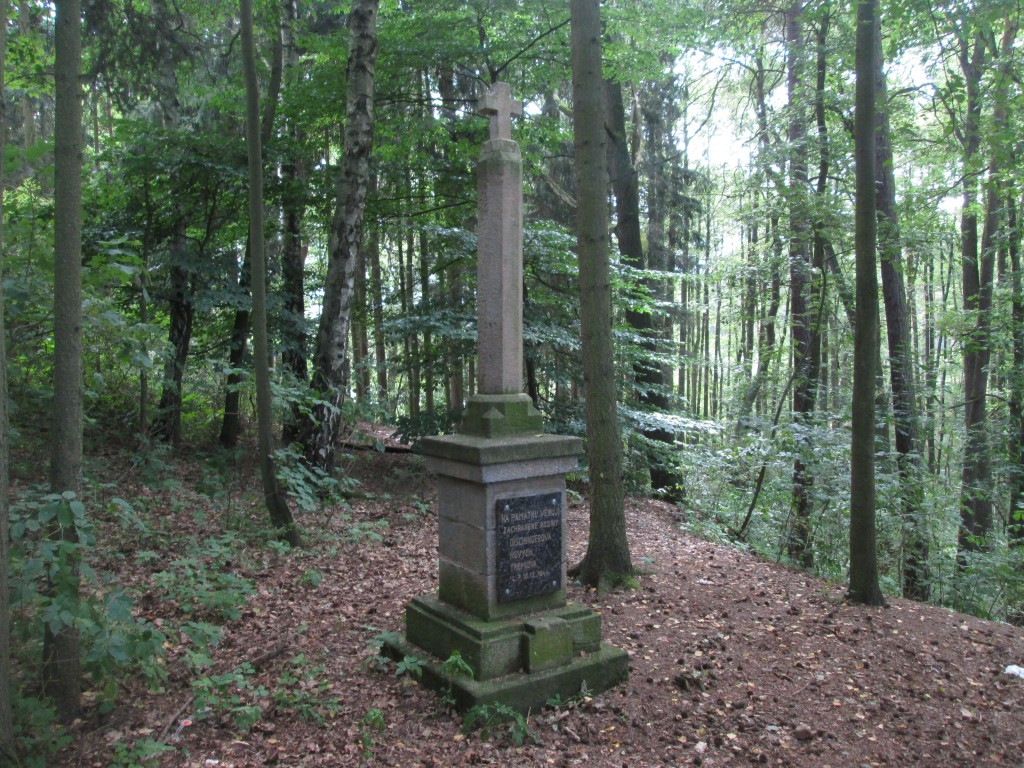 Boží muka, postavená jako poděkování za zachování lidských životů při náletu na Plzeň dne 16.12.1944.